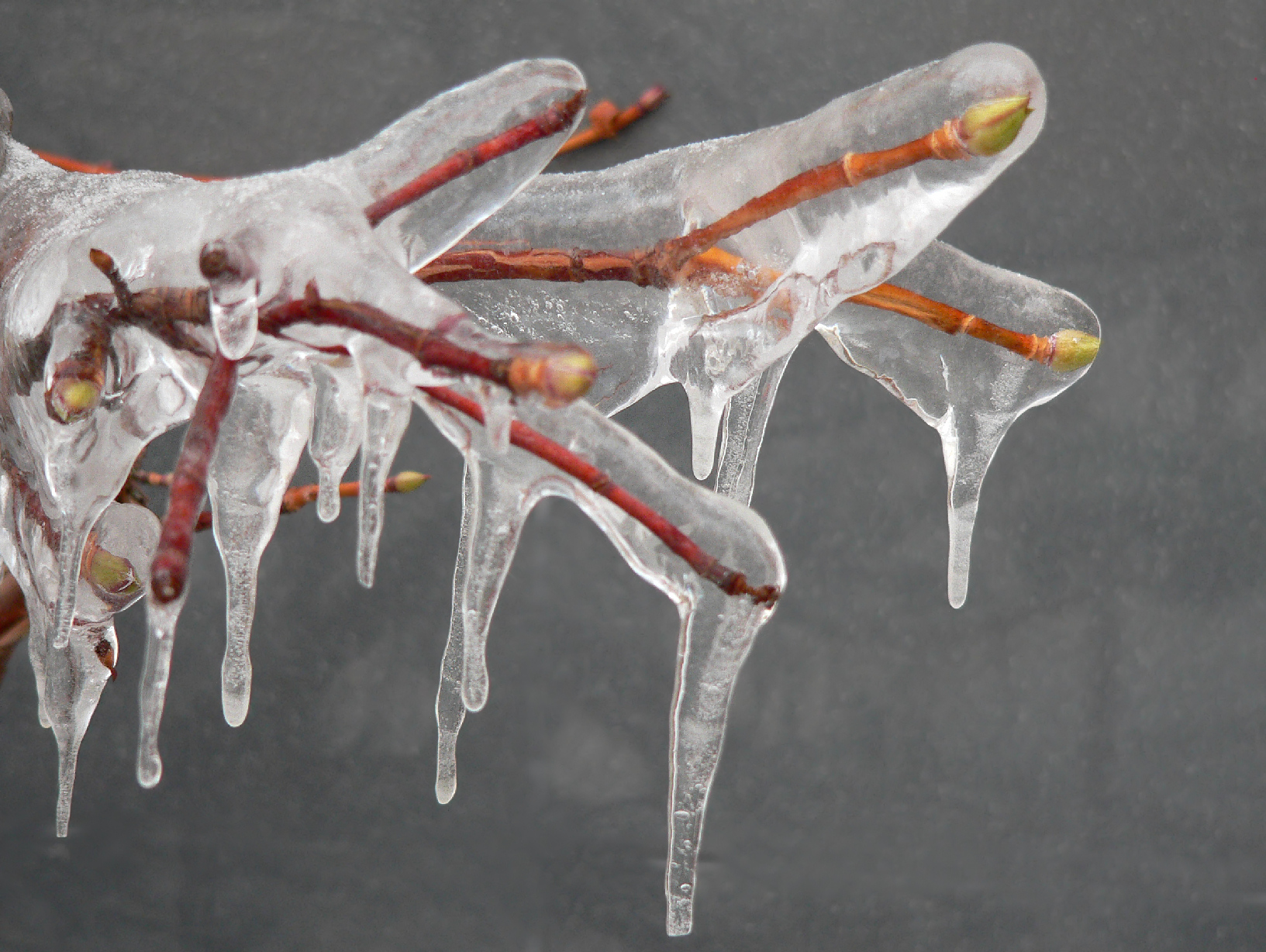 Zweige Knospen gefroren